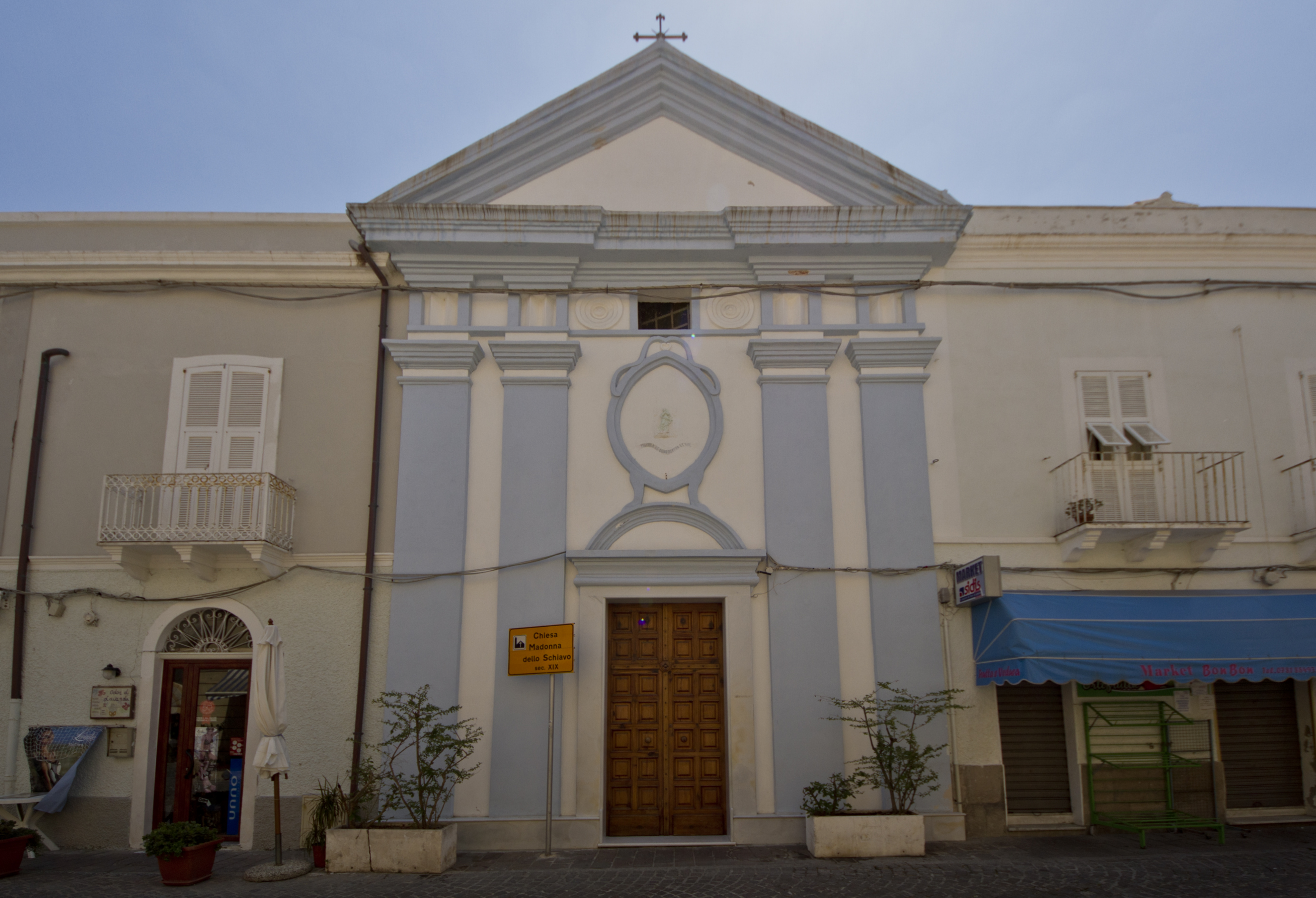 La Chiesa della Madonna dello Schiavo, Carloforte, Isola di San Pietro, Carbonia-Iglesias, Sardinia, Italy